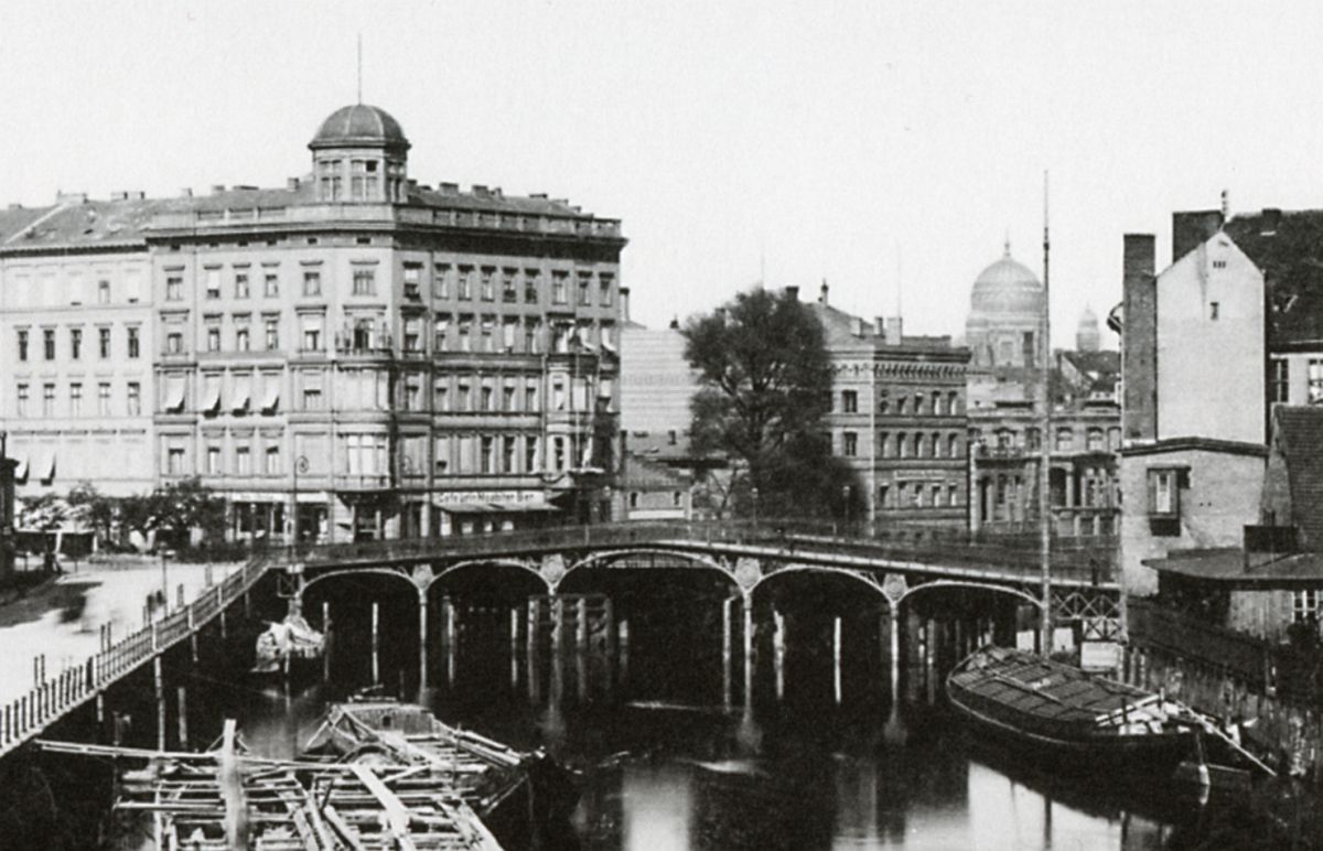 Spree Weidendammer Brücke in Berlin